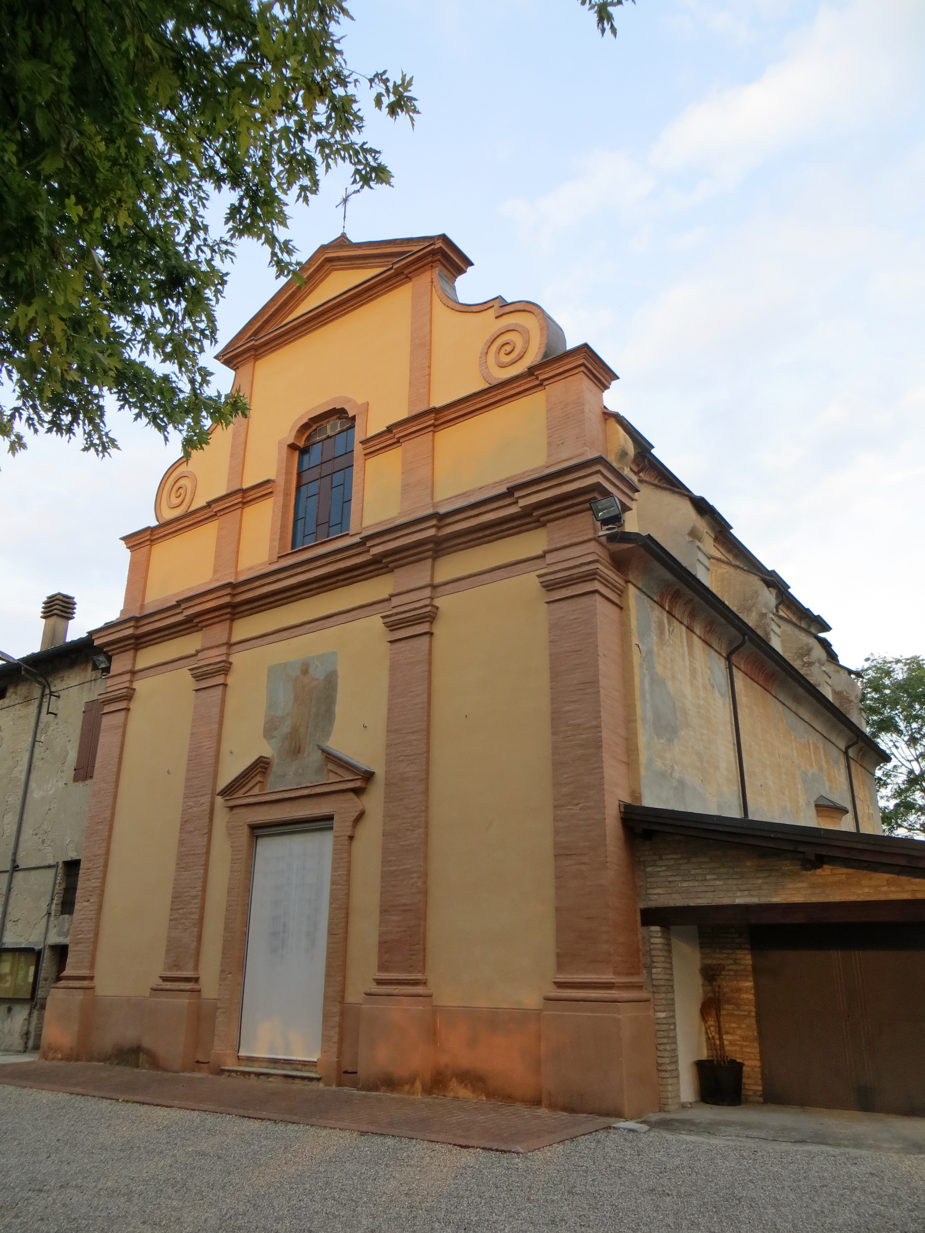 Chiesa dei Santi Giovanni Battista e Lorenzo (Bianconese, Fontevivo) - facciata